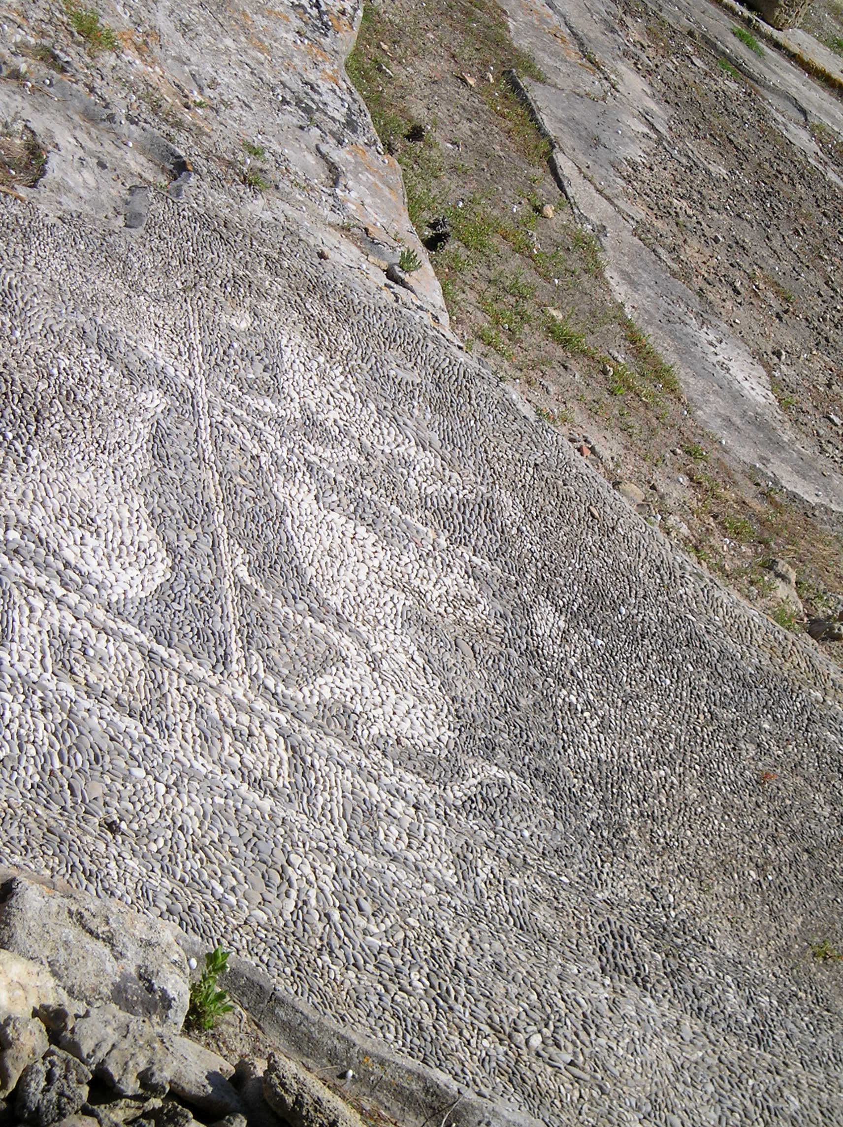 Mozia, Sicilia, la casa dei mosaici.